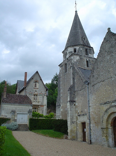 Dierre - Église/Church. 12 May 2007 The church in Dierre, France